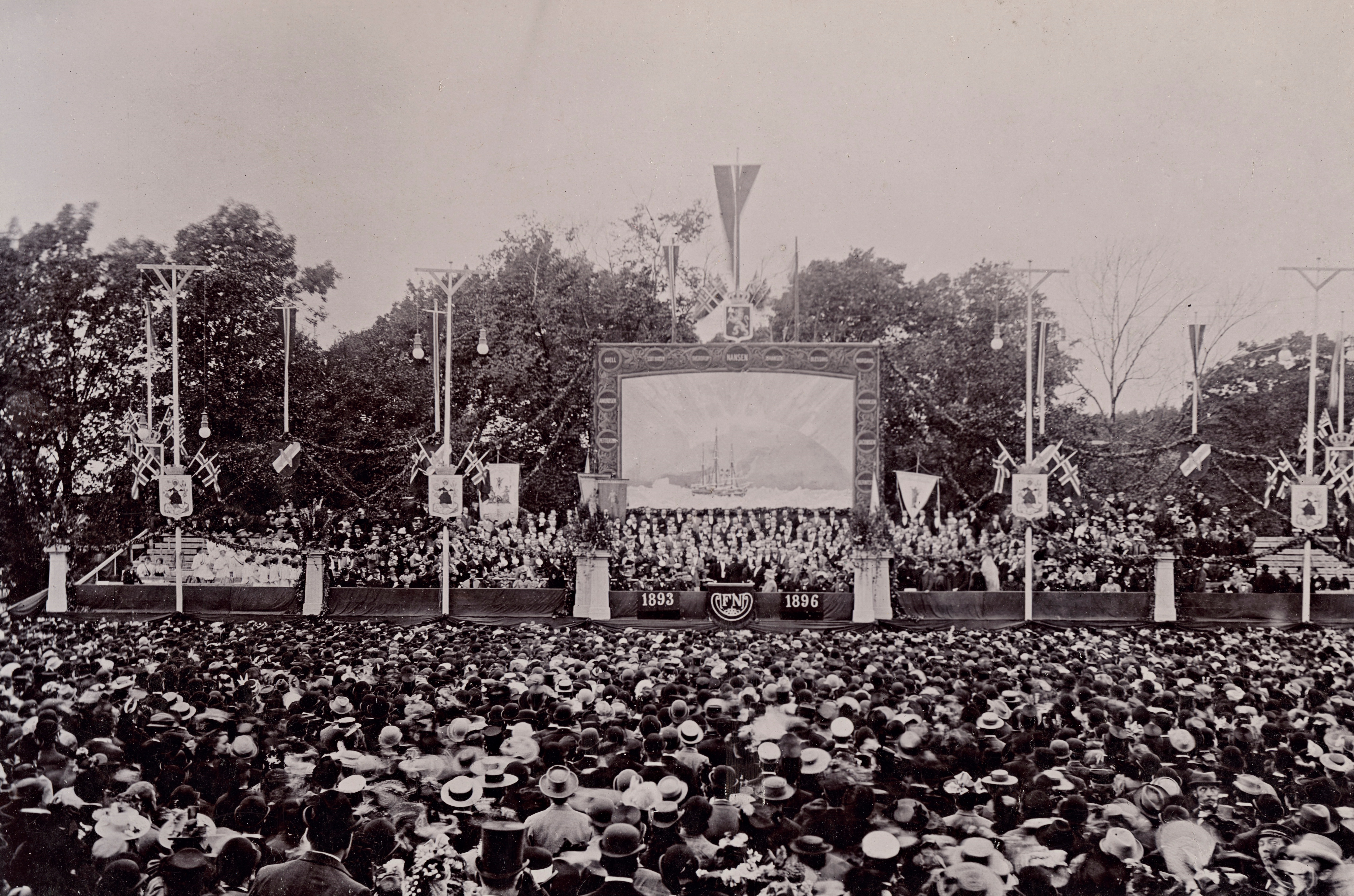 En liten del av menneskemassene på Festningsplassen under folkefesten for Nordpolekspedisjonens medlemmer etter hjemkomsten til Kristiania. Like til venste for talerstolen står de tretten polfarerne. Til høyre: Bjørnstjerne Bjørnson i lys frakk (sittende). Tribunen er pyntet med flagg, vimpler, girlandre og store bilder fra ekspedisjonen. Depicted person: Bjørnson, Bjørnstjerne (1832-1910) Depicted place: Oslo